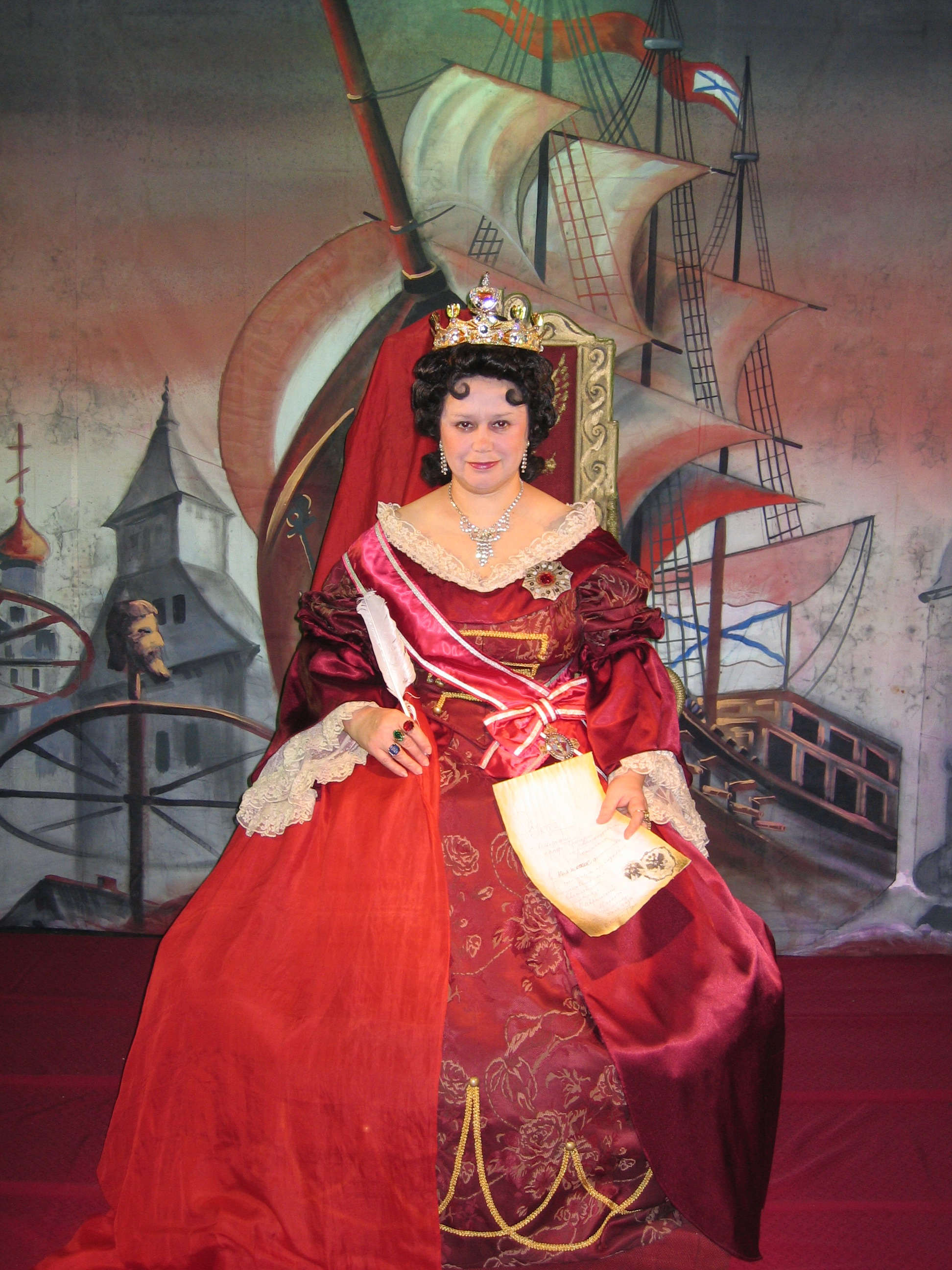 Татьяна Кудрявцева в роли Екатерины I из спектакля "Смерь и любовь. Женщины Петра Великого", режиссёр-постановщик Егоров Геннадий Семёнович